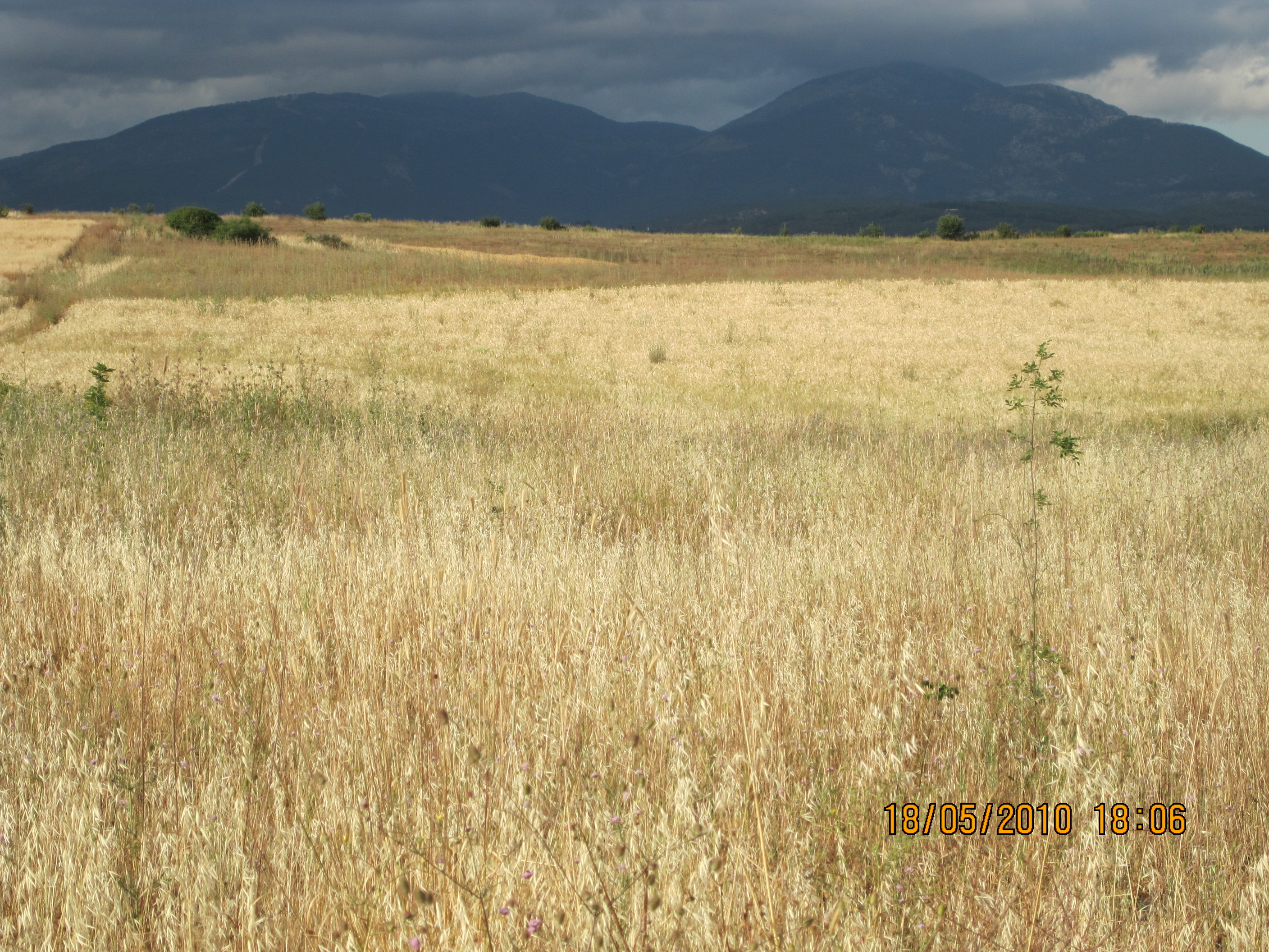 Ege Yolculuk _122 - Izmir Otoyolu / Autobahn / Highway